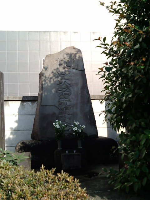 谷中の瑞輪寺にある枕山の墓